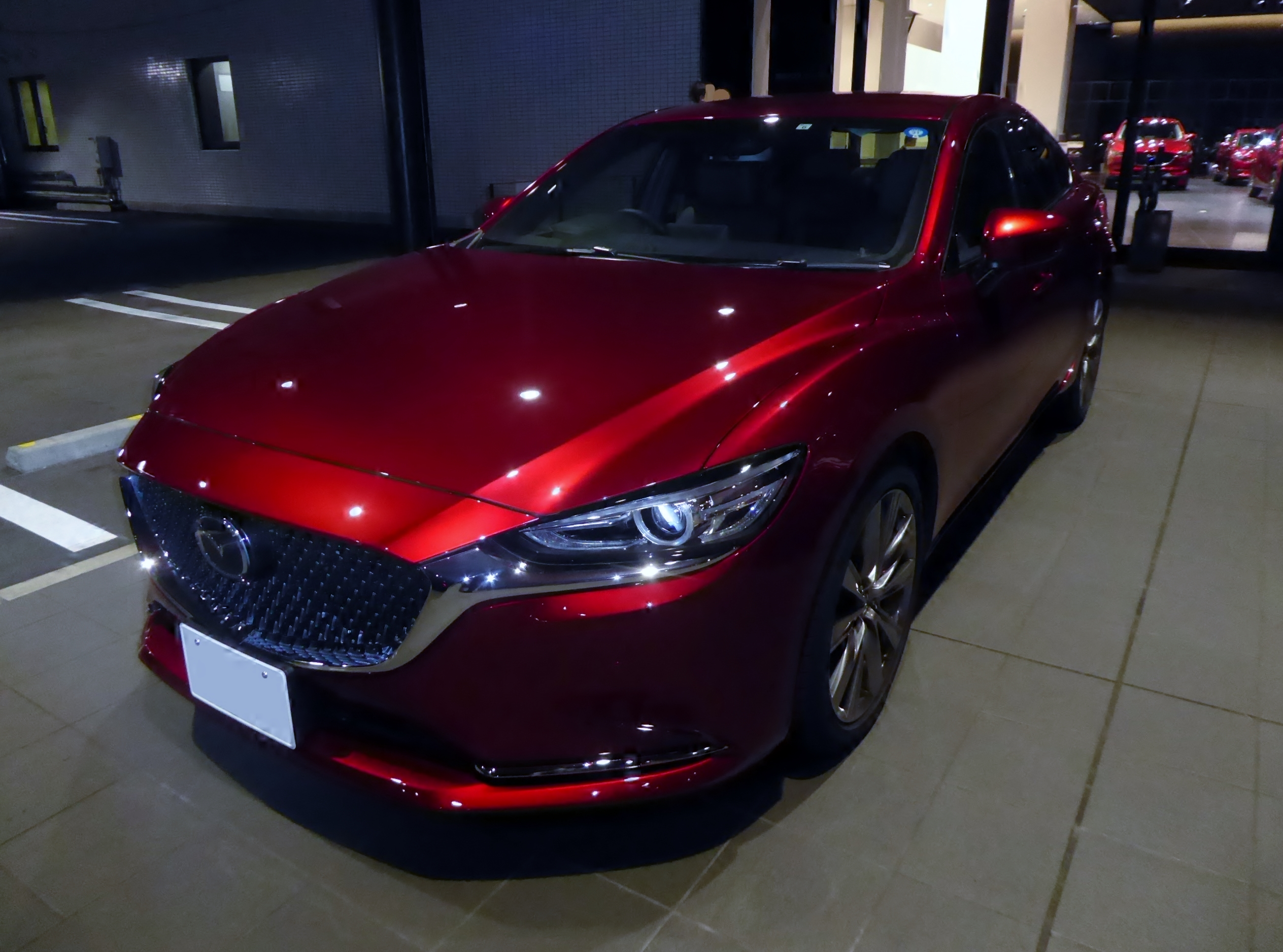 6BA-GJ5FP型マツダ・アテンザセダン25S L Packageを夜間にフロントから撮影。